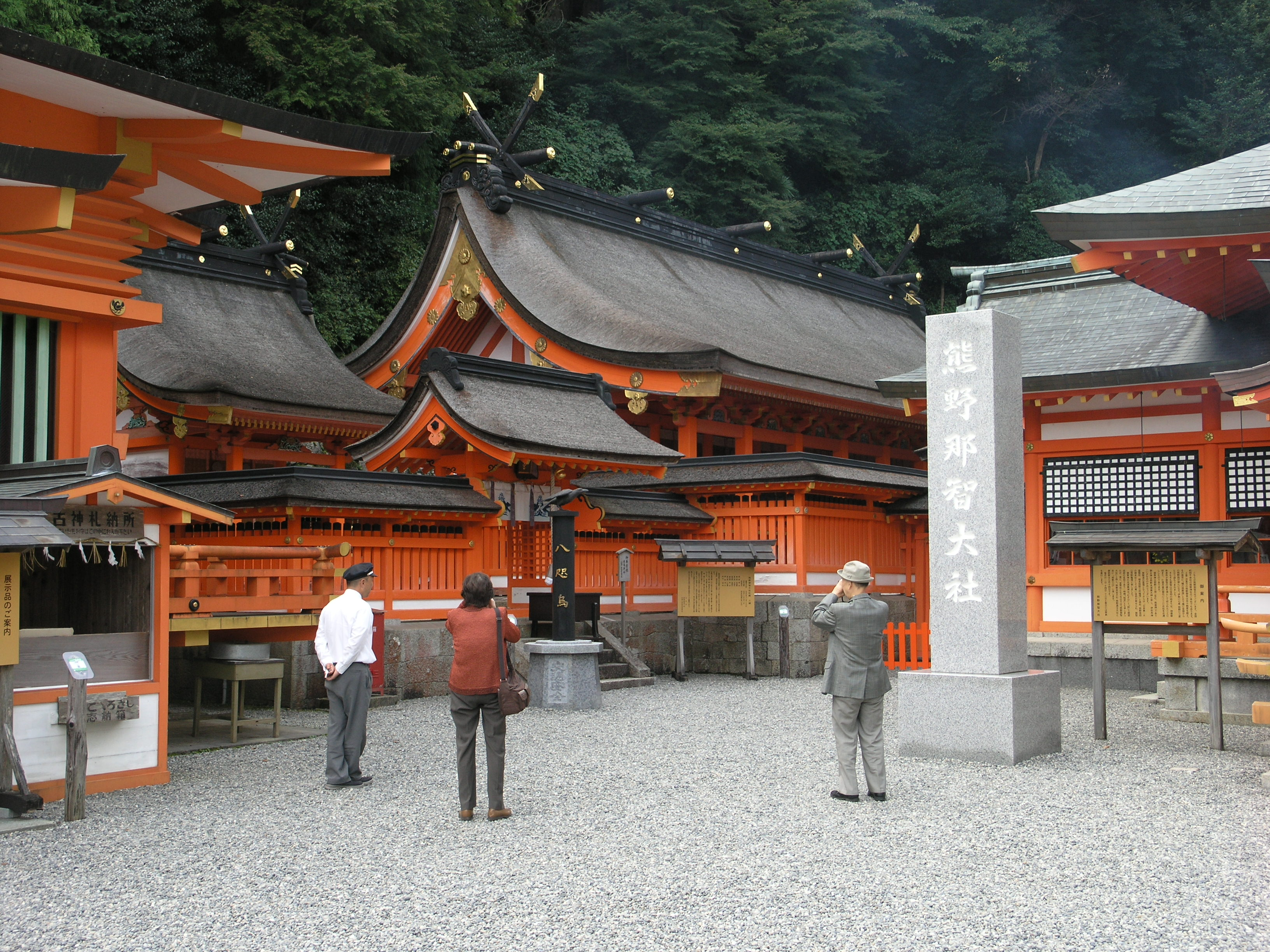 熊野那智大社 (和歌山県東牟婁郡那智勝浦町) 2008年10月撮影。 機材：C8080WZ 撮影者：Kansai explorer